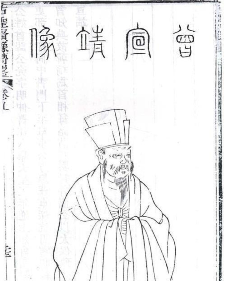 曾公亮像，取自清顾沅辑《古圣贤像传略》，道光十年刻本。